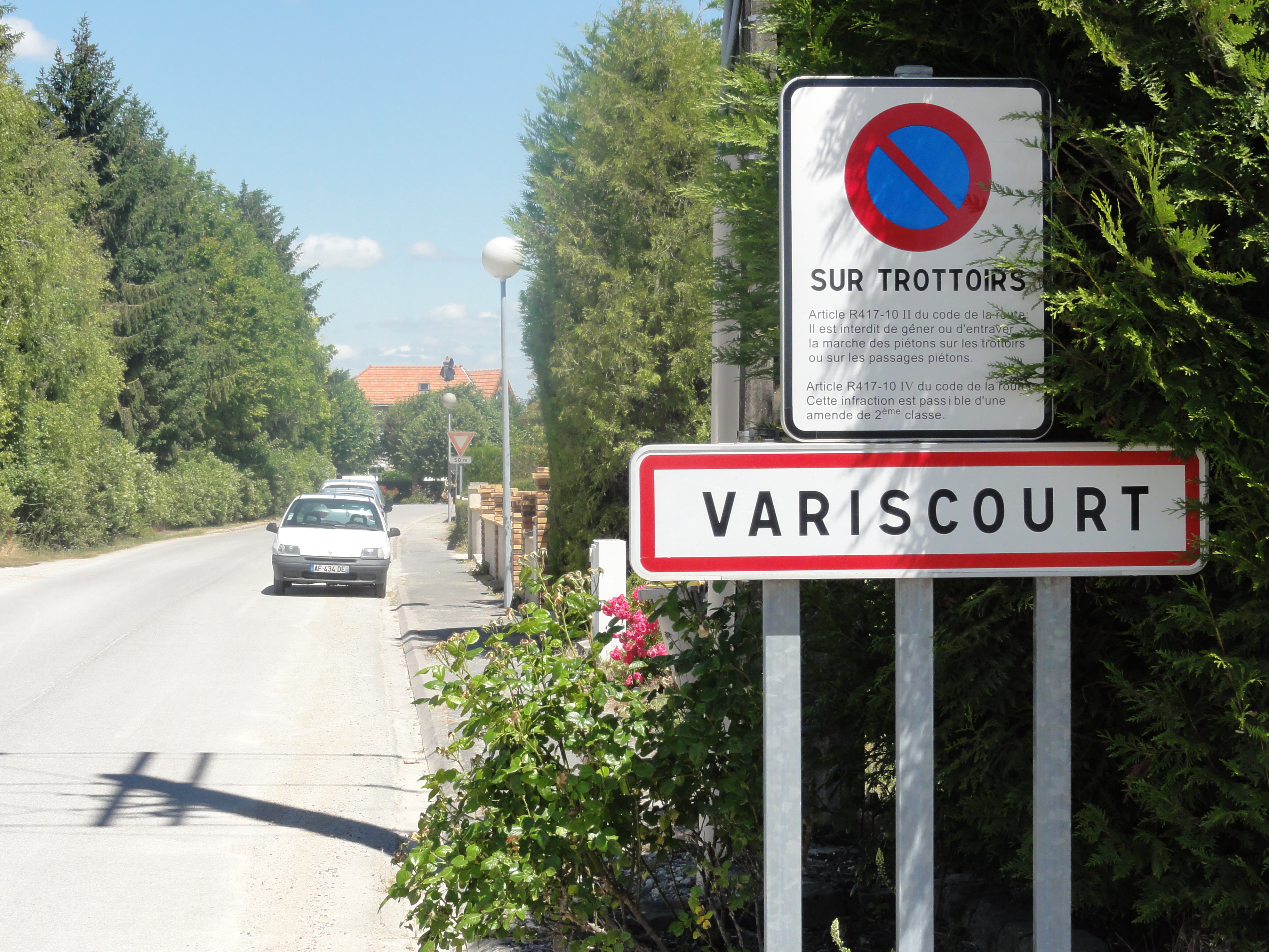 Variscourt (Aisne) city limit sign